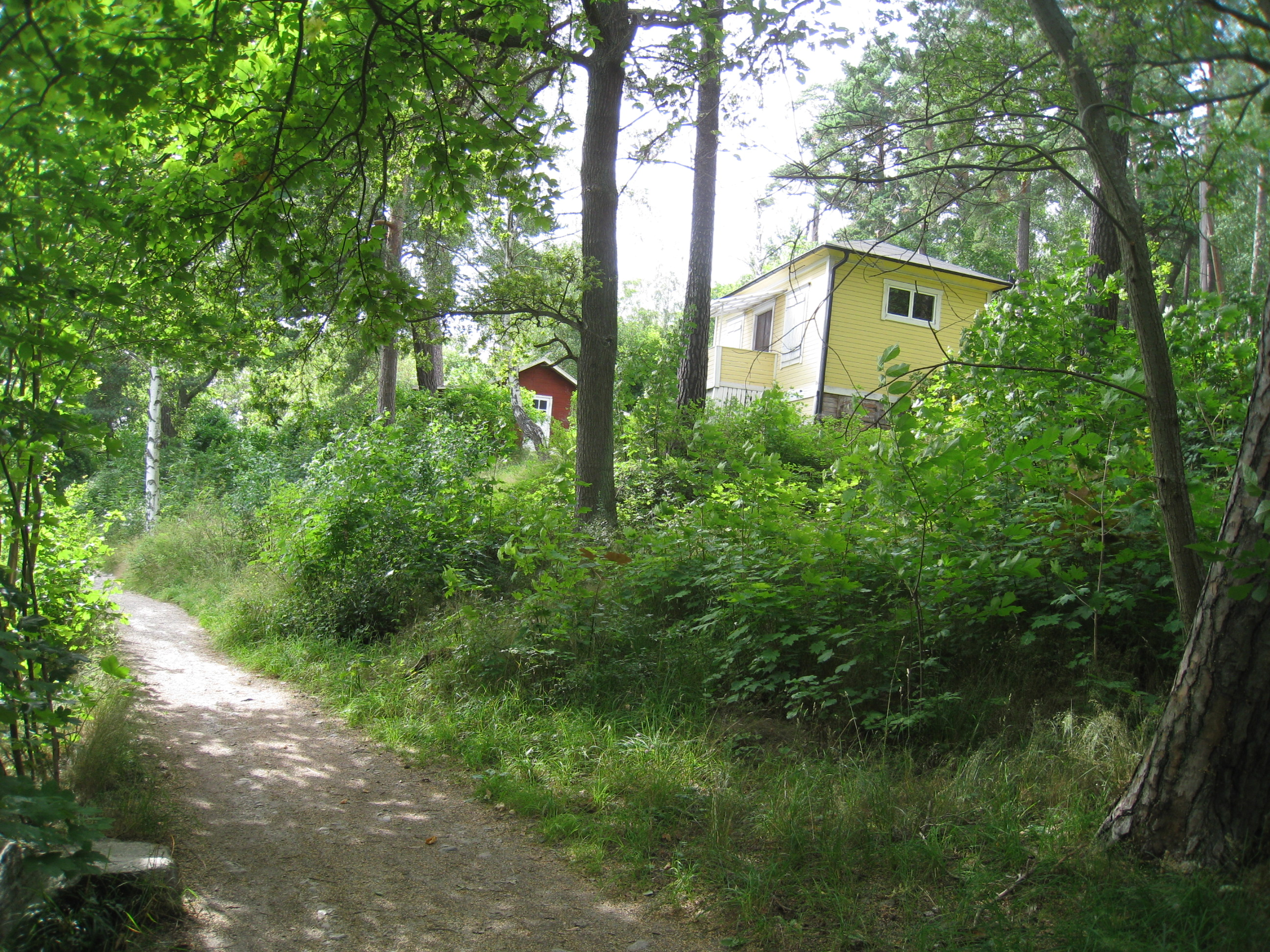 Ålstensskogens natur vid Mälaren i stadsdelen Ålsten i södra Bromma, väster om Stockholm.